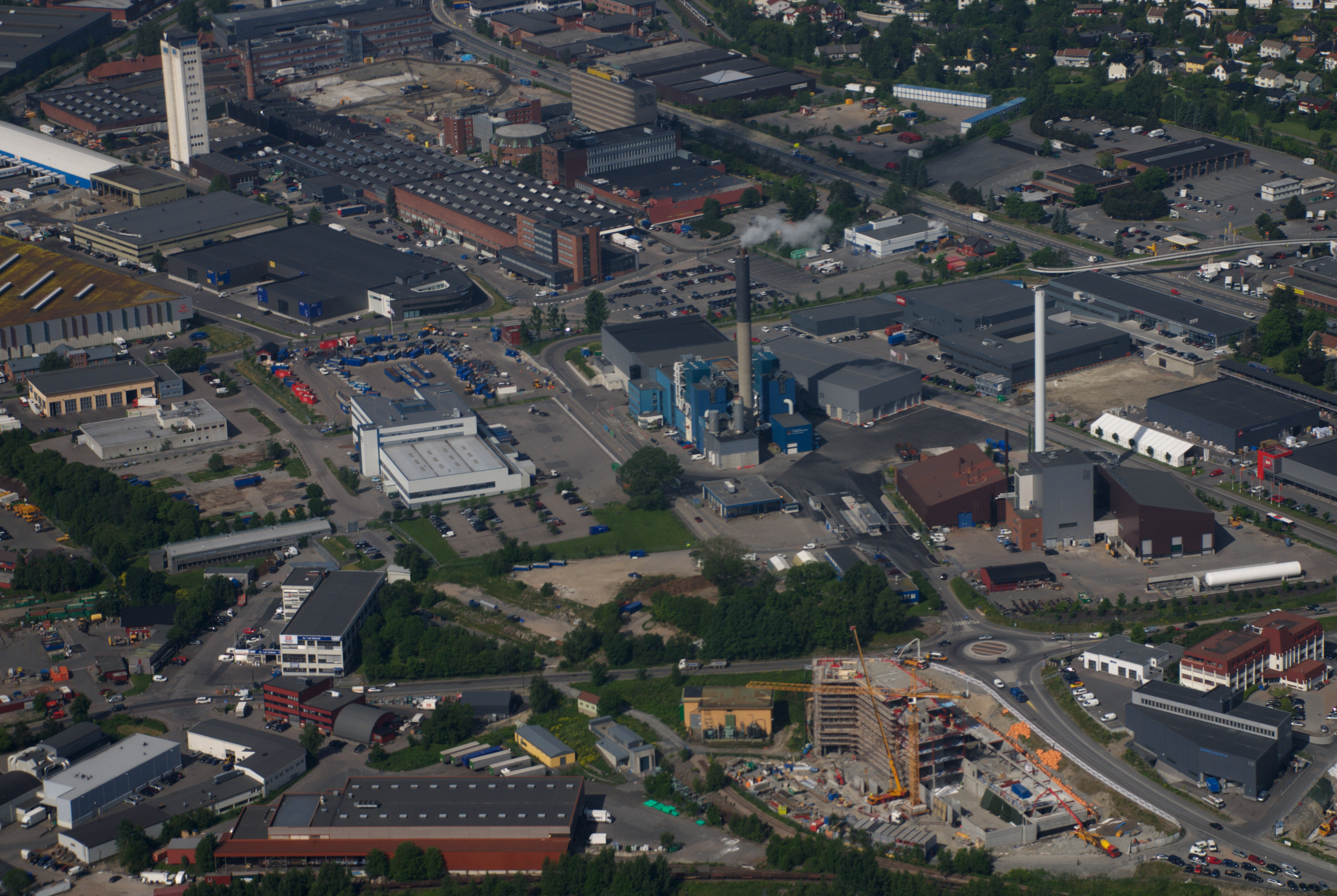 Brobekk